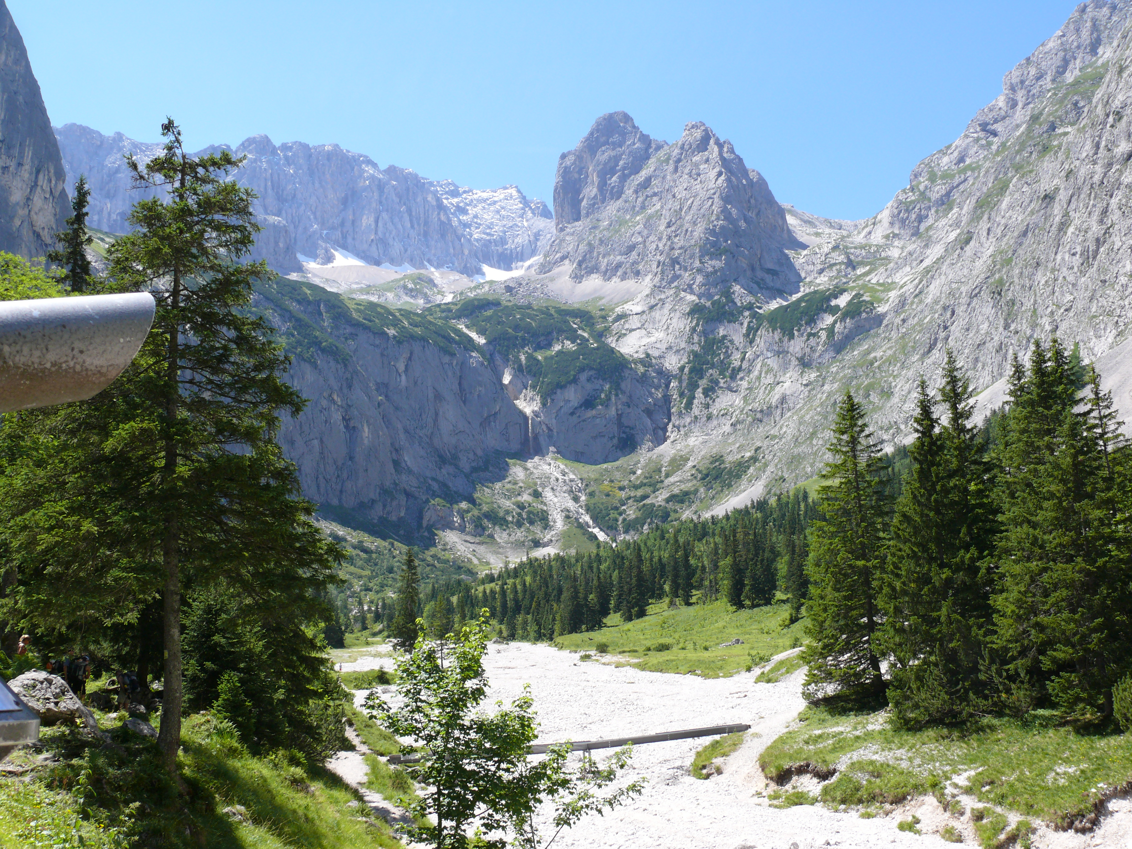 Talschluss hinter der Höllentalangerhütte